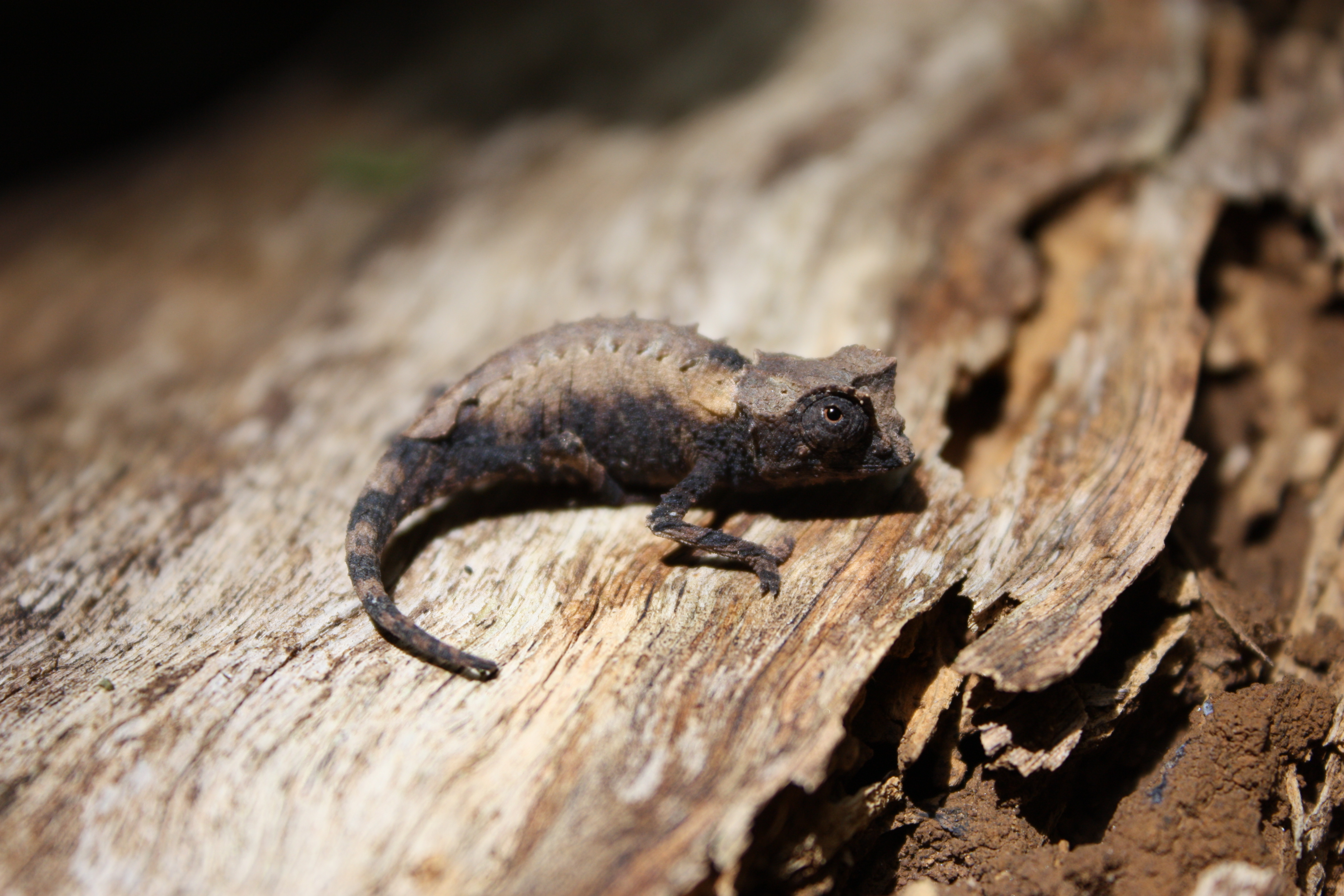 juvenile Brookesia stumpffi, Ankarana, N Madagascar